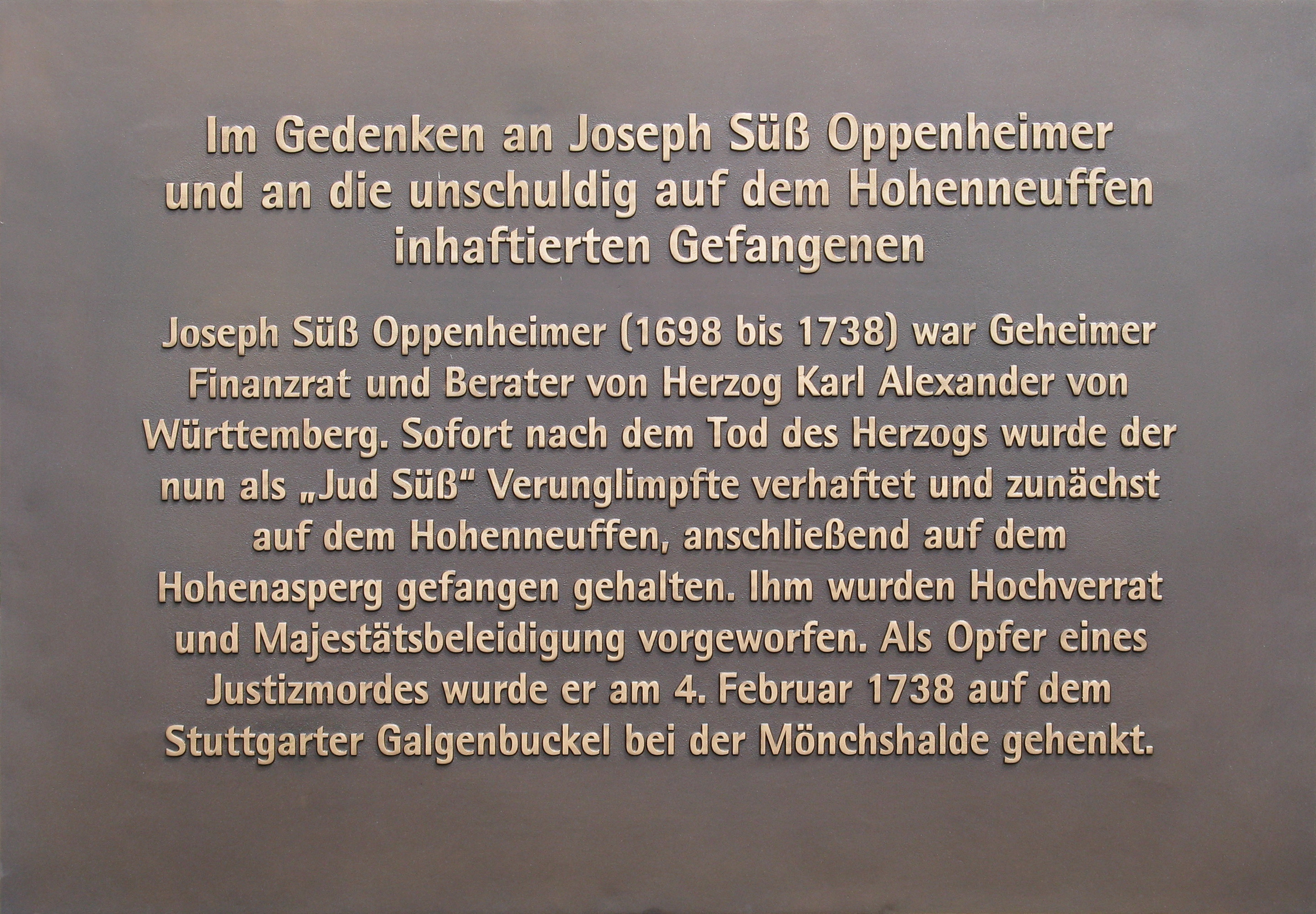 Burg Hohenneuffen - Gedenktafel für Joseph Süß Oppenheimer (1698 - 1738), der auf der Burg Hohenneuffen unschuldig arrestiert und später in Stuttgart durch einen Justizmord umgebracht wurde